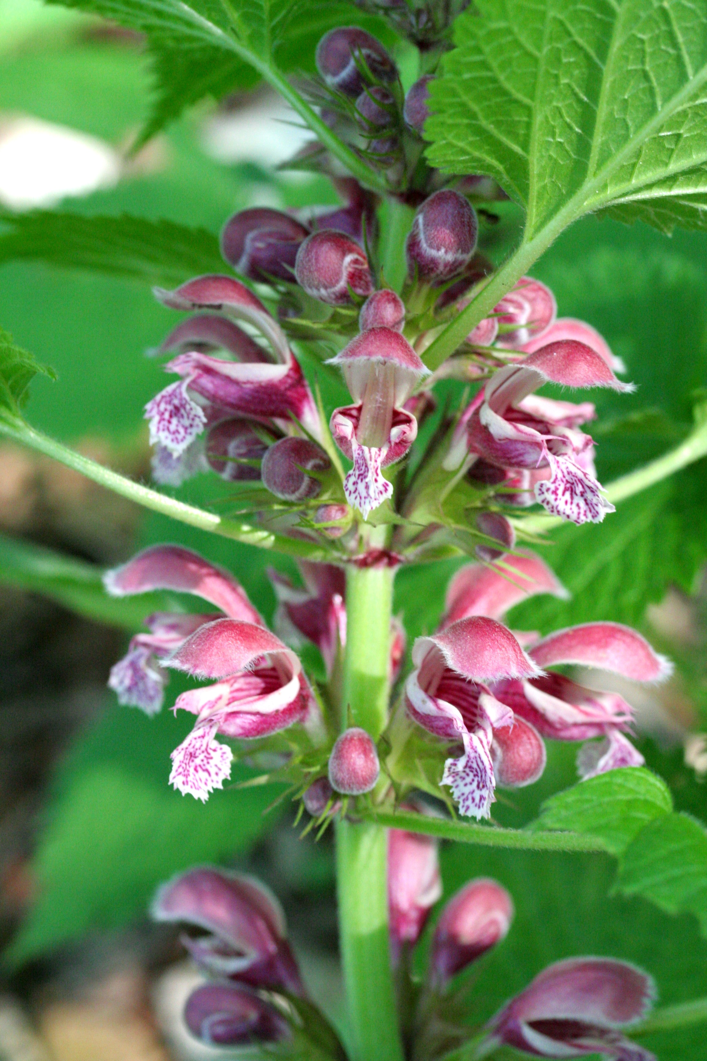 Falsa ortica maggiore - Località : Col di Navasa, Limana (BL), 500 m s.l.m.